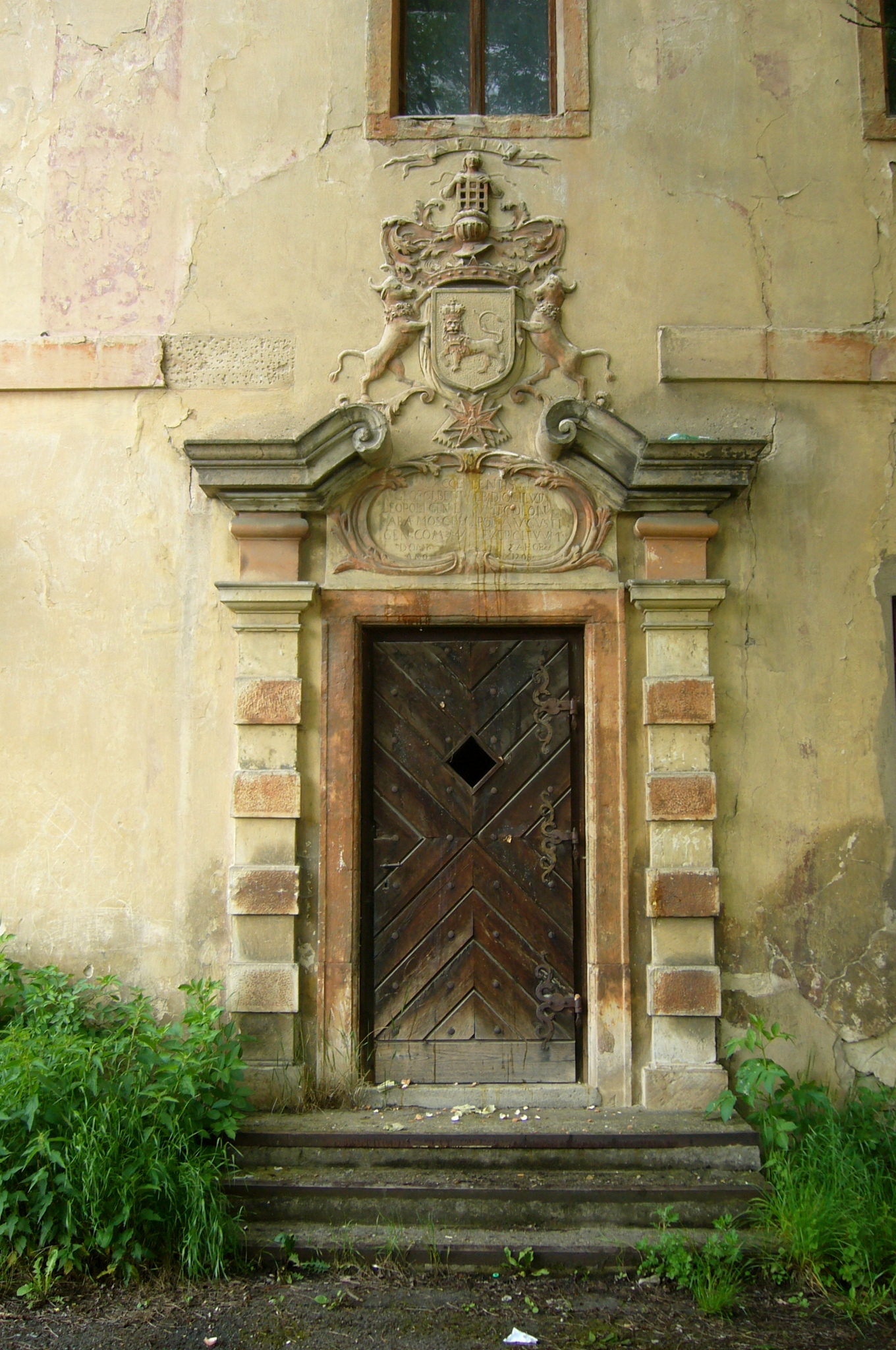 Portál z roku 1708